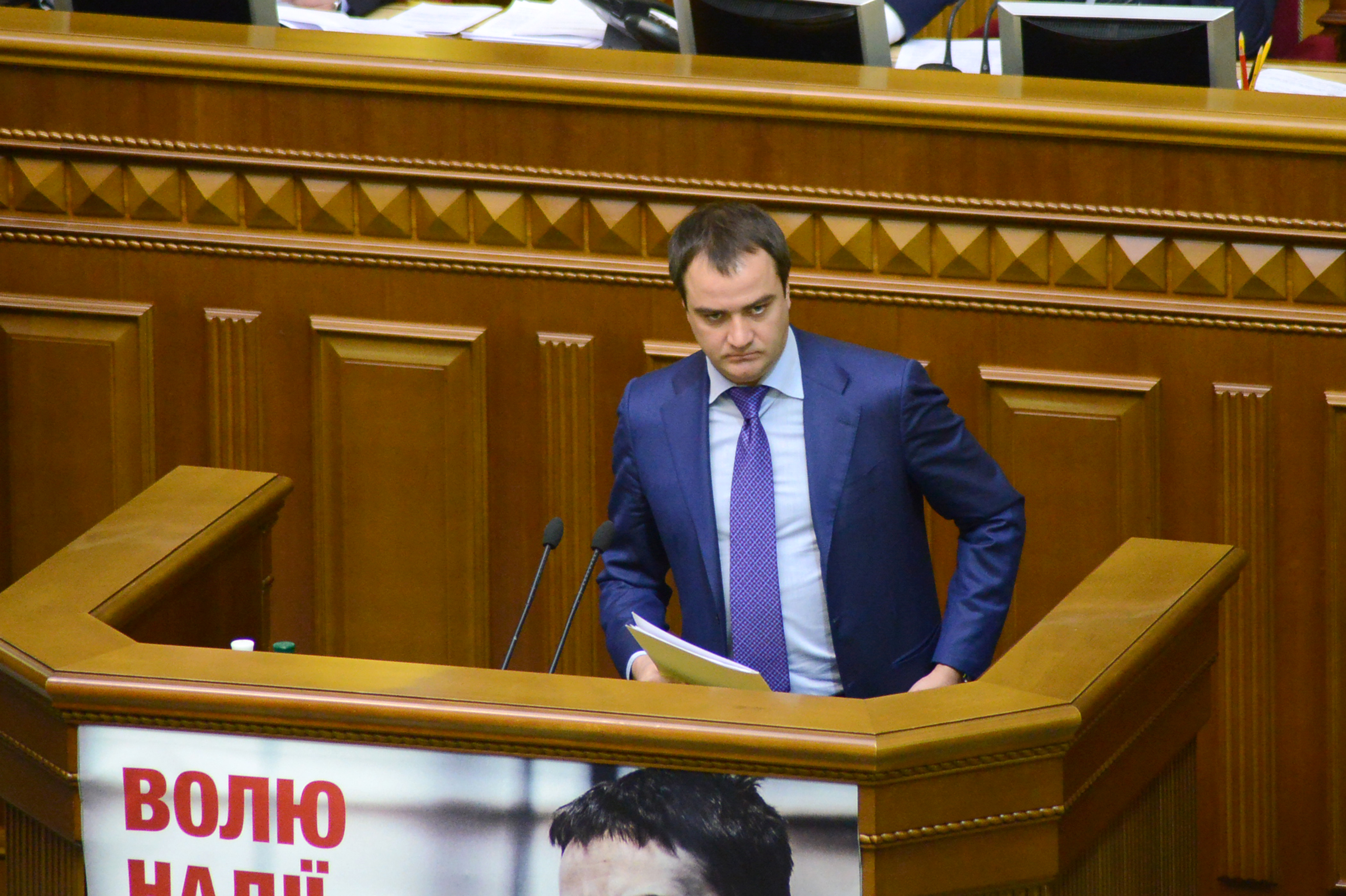 Верховна Рада УКРАЇНИ 2015 фотограф Вадим Чуприна